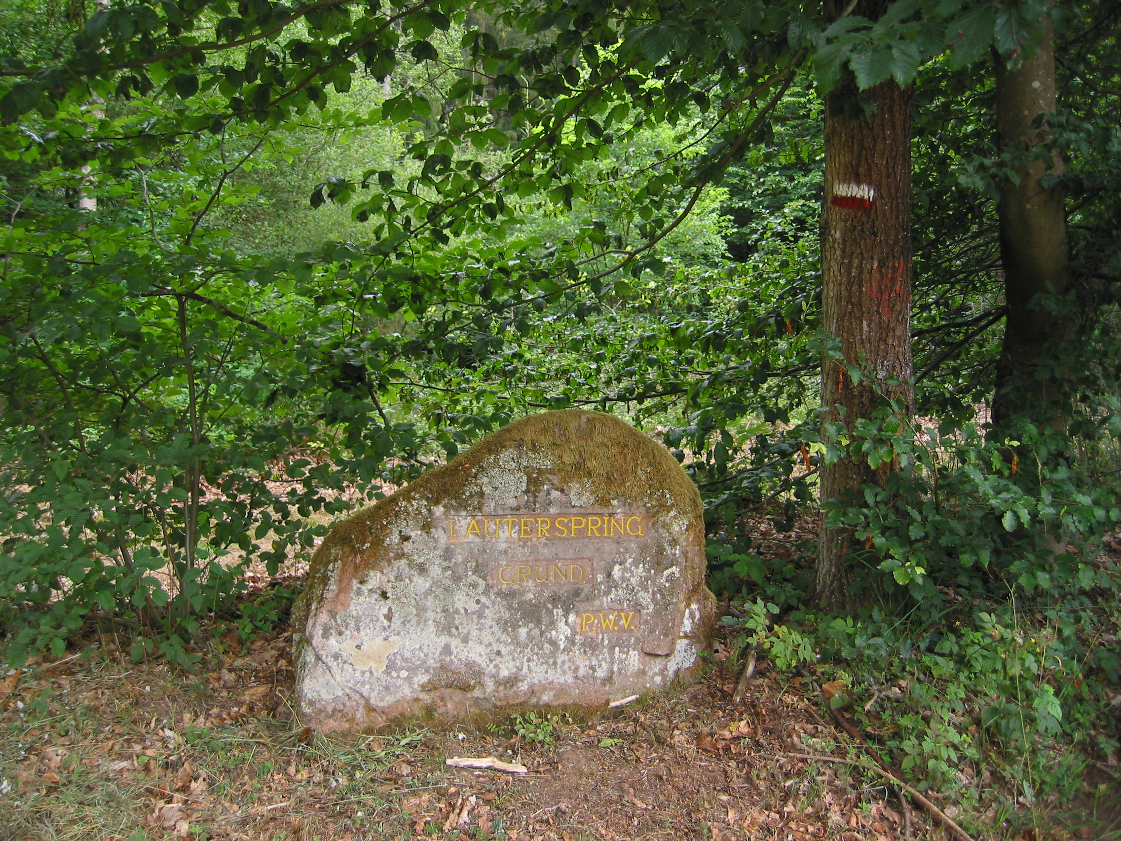 Ritterstein Nummer 294, Lauterspring Grund